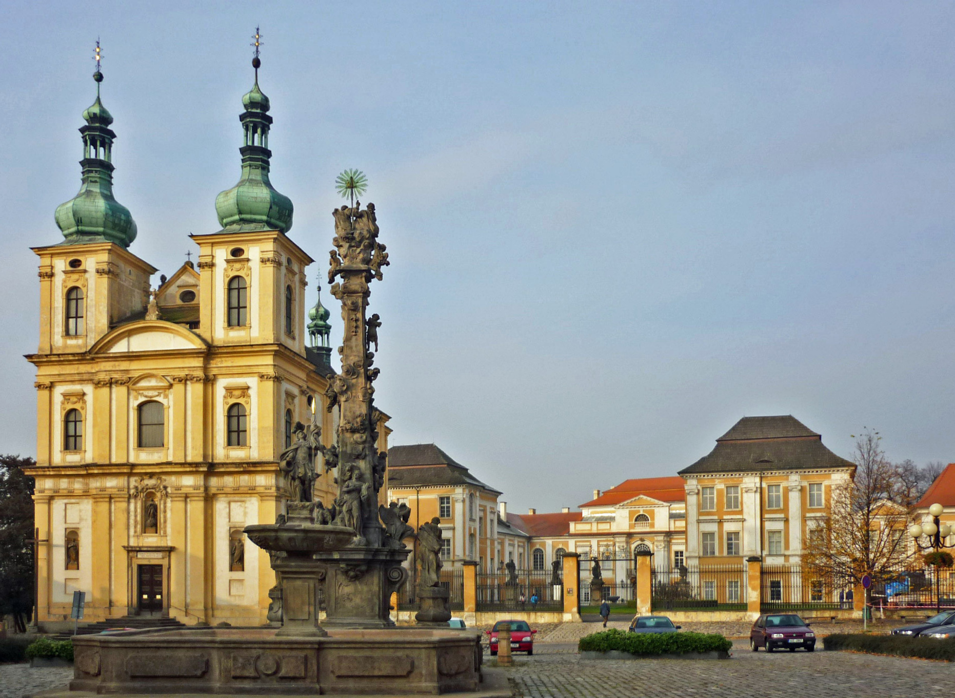 Schloss Dux (Duchcov) in Nordböhmen